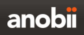 Il logo di Anobii.